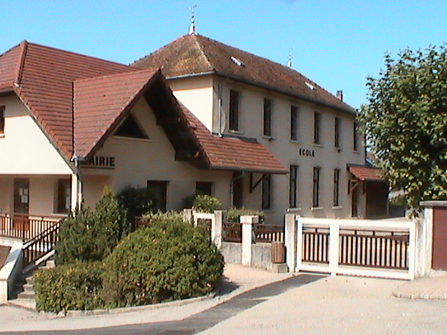 Mairie Ecole de Voissant